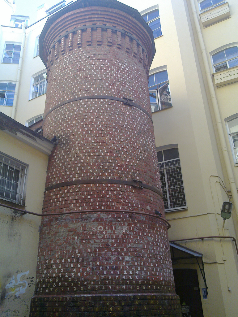 Башня грифона